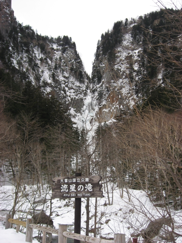 流星の滝（層雲峡） / Ryuusei-no-taki (a waterfall at Kamikawa, Hokkaidō)